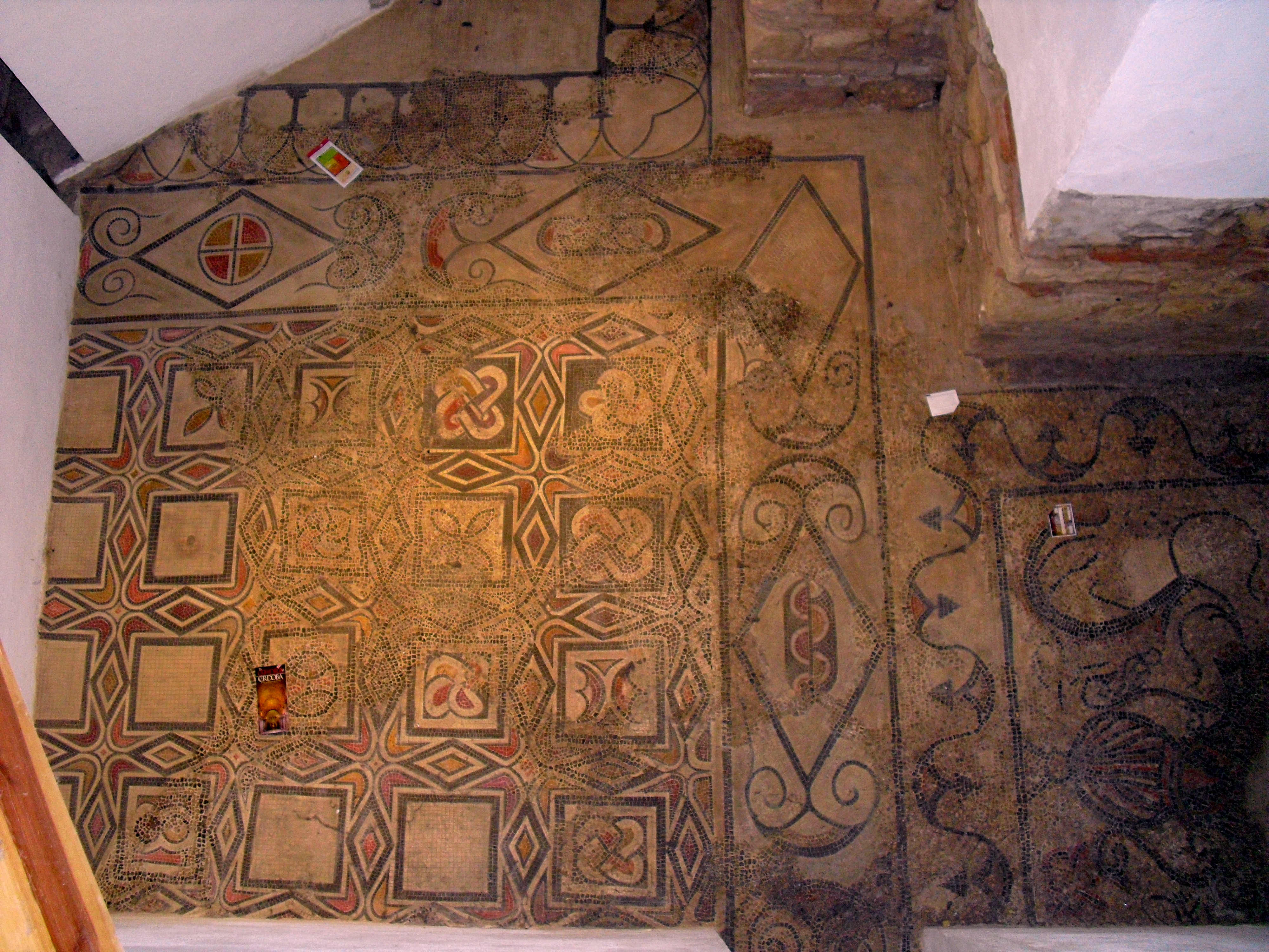 Restos de la basílica de San Vicente en la Mezquita de Córdoba, España.